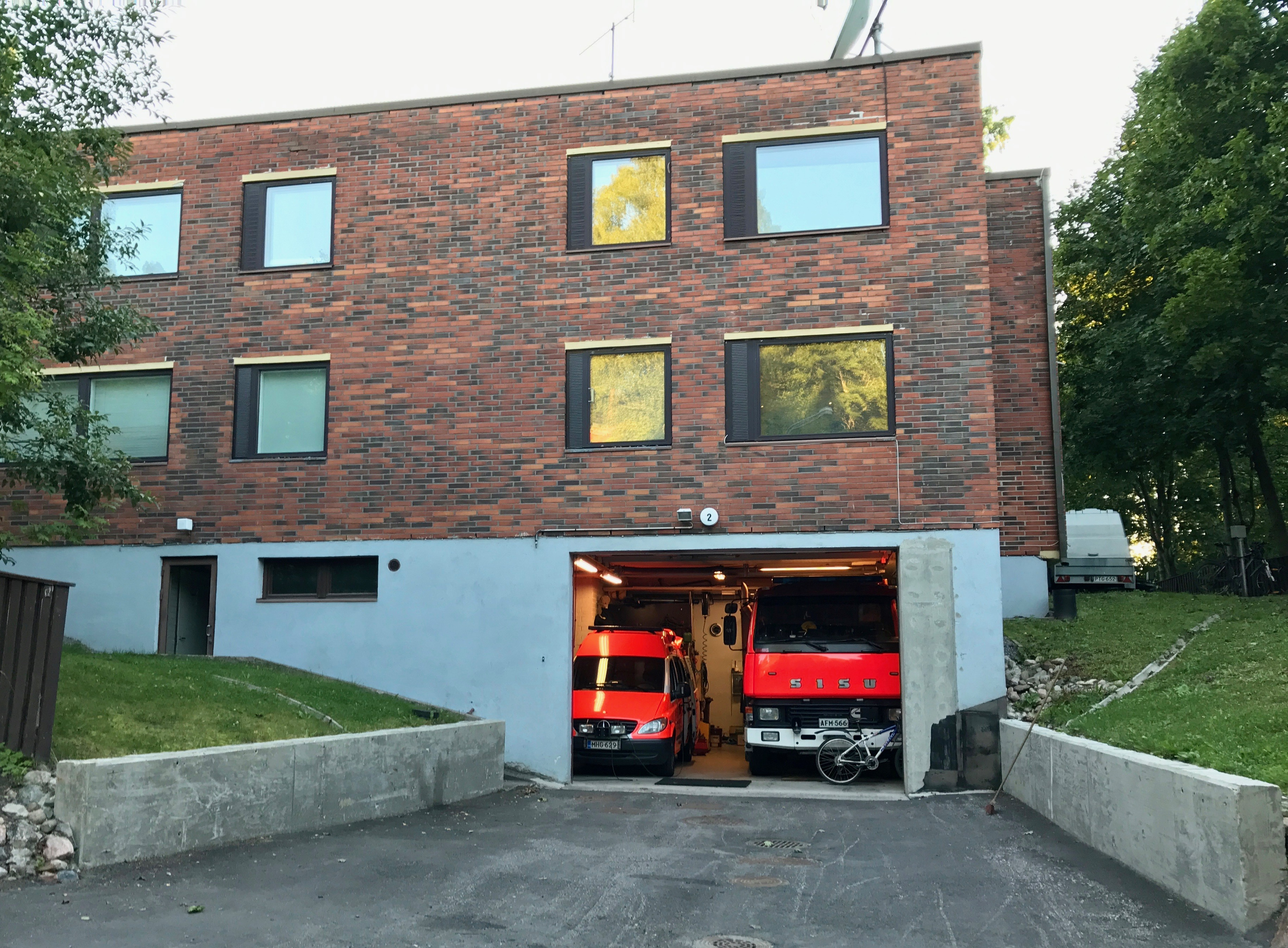 Oulunkylän VPK:n talli Otto Brandtintiellä Helsingissä.